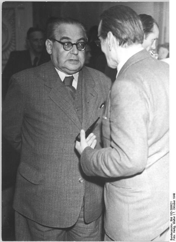 ADN-ZB Heilig 7.10.1949 Berlin: Gründung der Deutschen Demokratischen Republik am 7.10.1949. Im Gebäude der DWK (Deutsche Wirtschaftskommission) in der Leipziger Straße fand am 7.10.1949 die 9. Tagung des Deutschen Volksrates statt, auf der das Manifest der Nationalen Front des demokratischen Deutschland verkündet wurde. Der Deutsche Volksrat konstituierte sich zur Provisorischen Volkskammer der Deutschen Demokratischen Republik. Prof. Hermann Kastner (links) während einer Pause im Gespräch. 4130-49